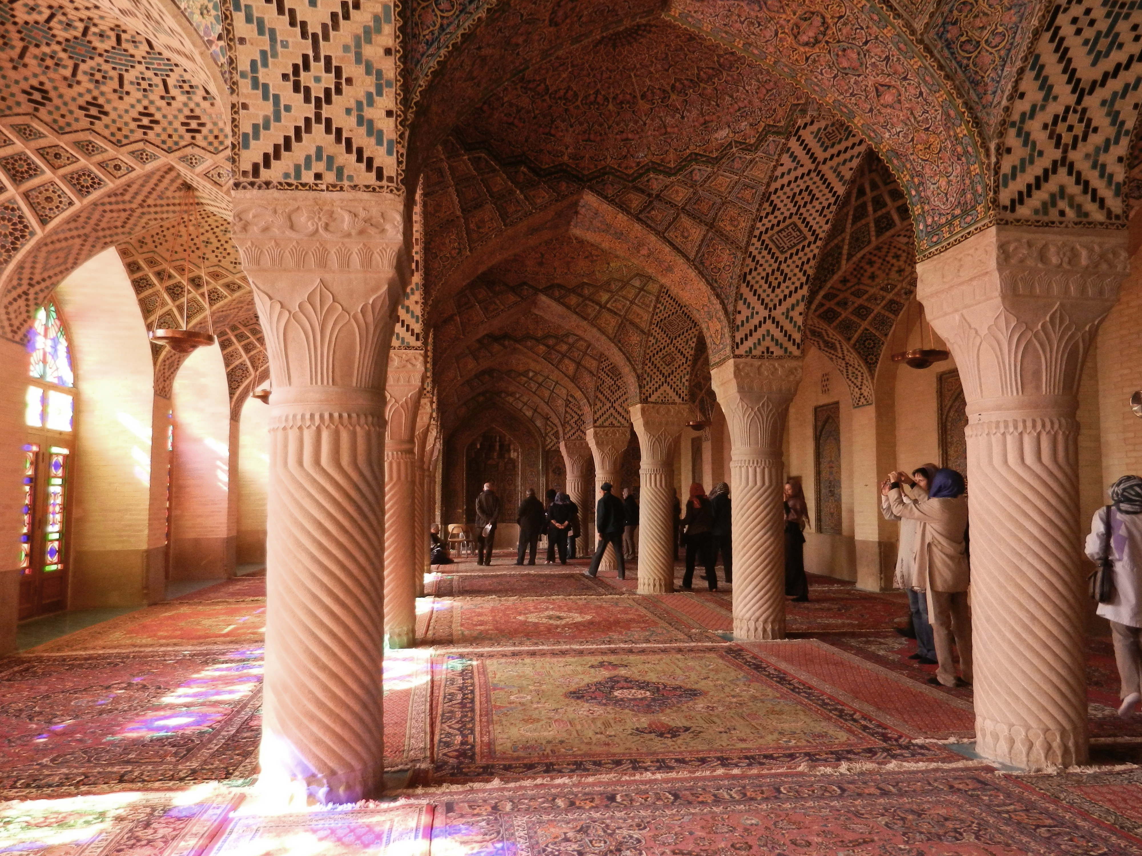 Shiraz, Iran - mošeja Nasir al-Mulk s preprogami.